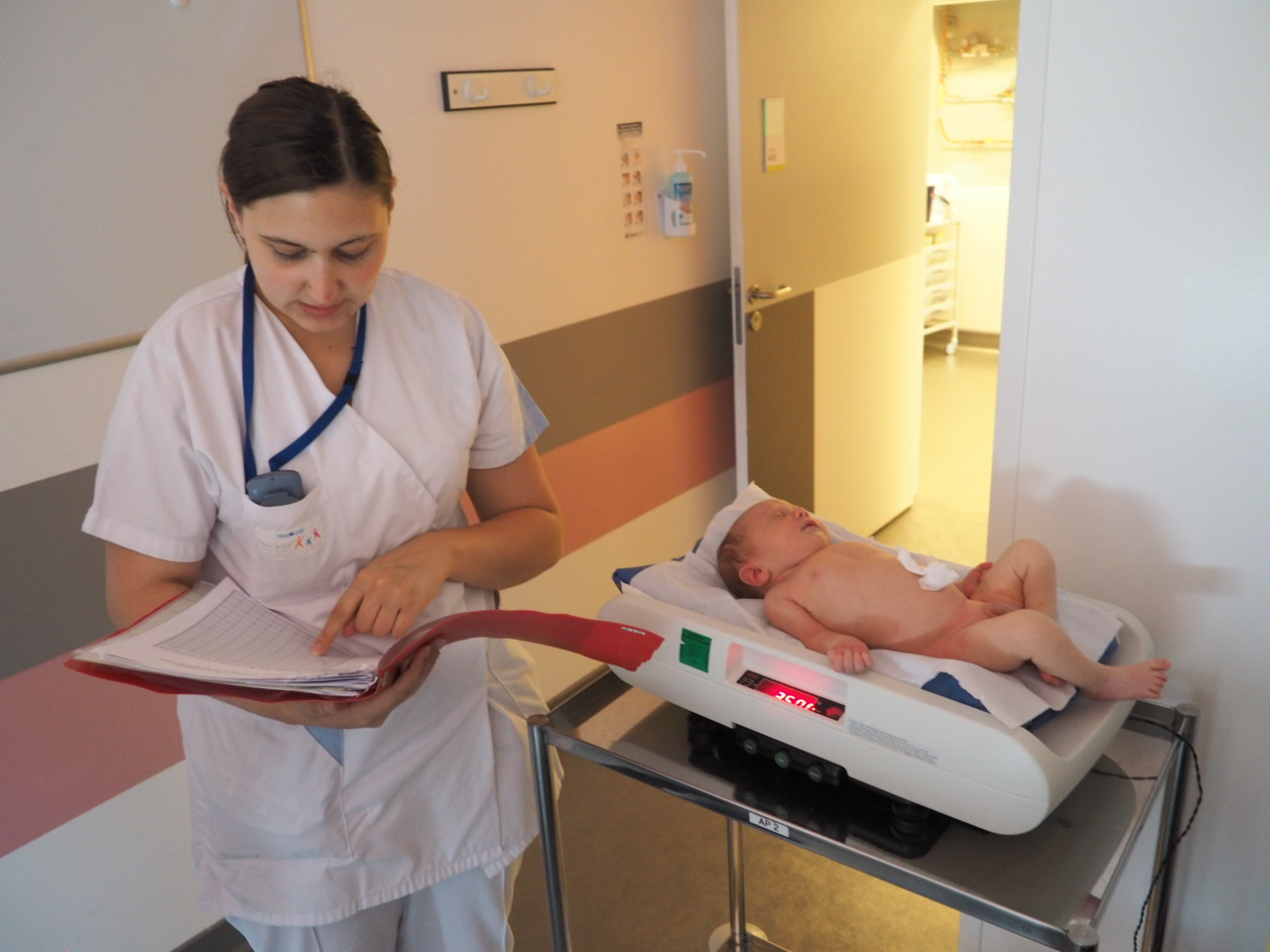 Pesé d'un nourisson à la maternité Necker (Paris)